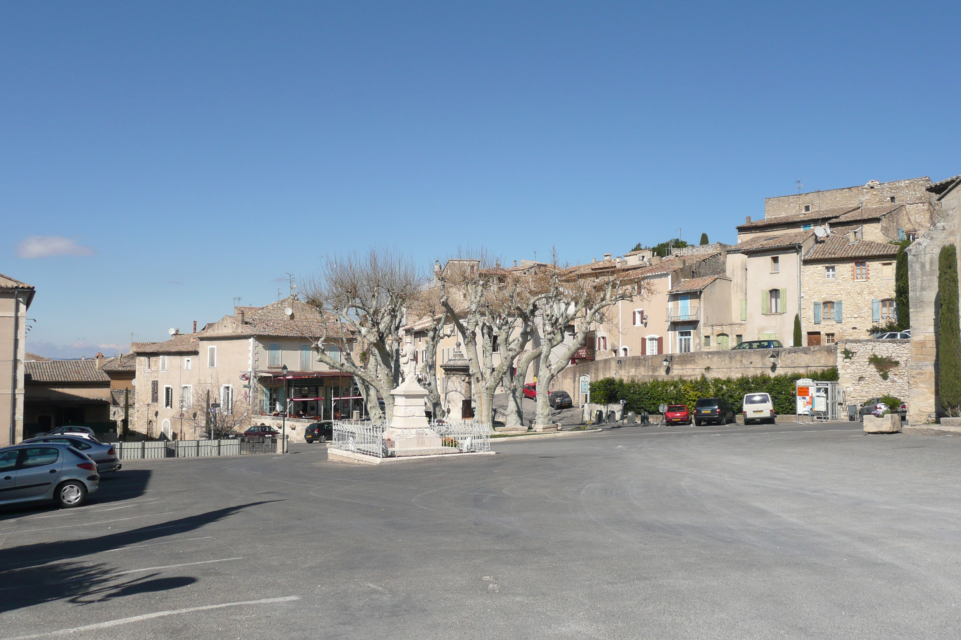 Place à Robion.